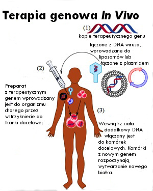 Terapia genowa in vivo. Na podstawie pracy [1]